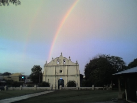 Iglesia colonial de la cuidad de nicoya